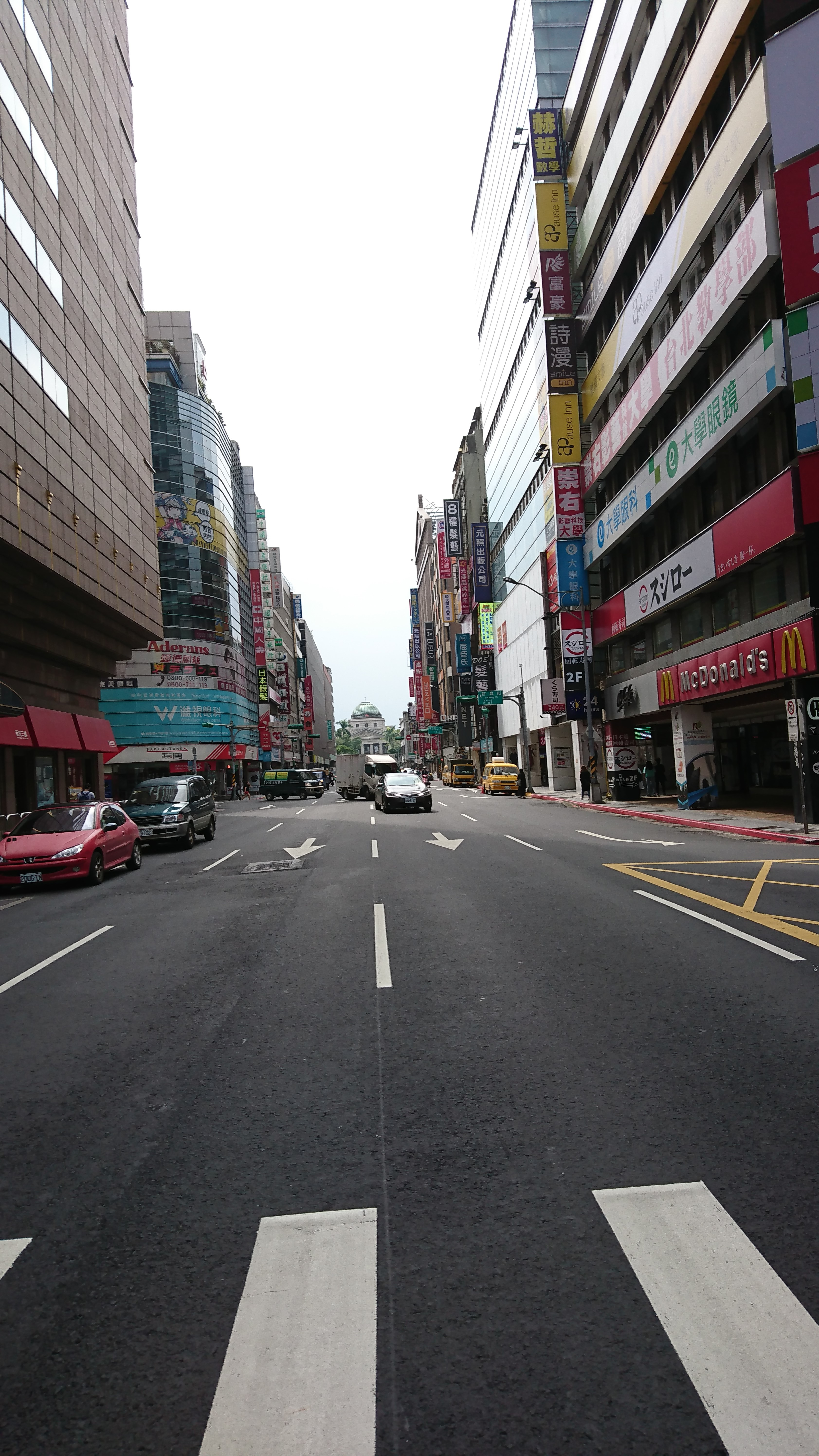 台湾台北市・館前路にて撮影した街並み。左手側に新光三越が見える。